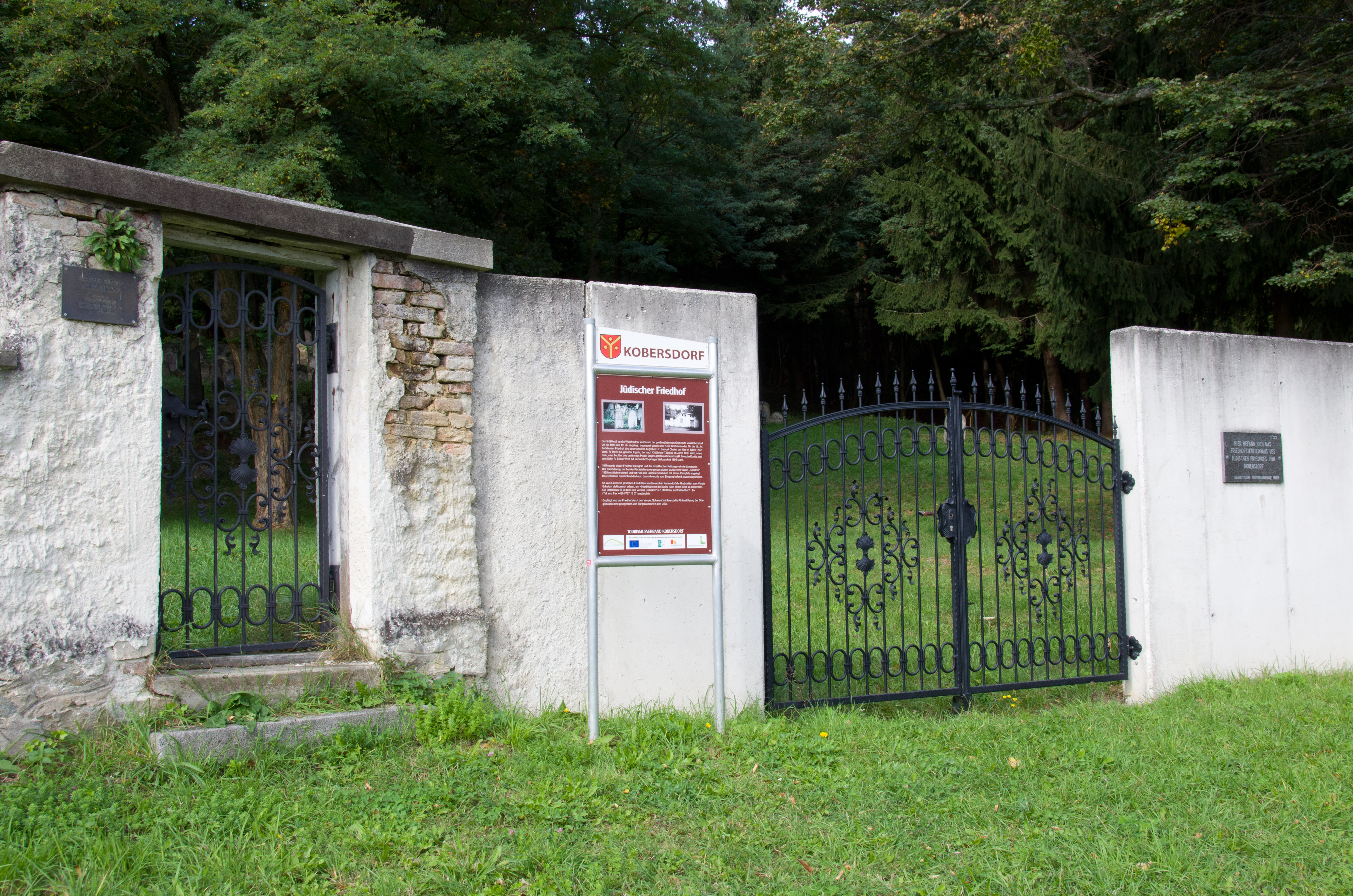 Friedhof israelitisch